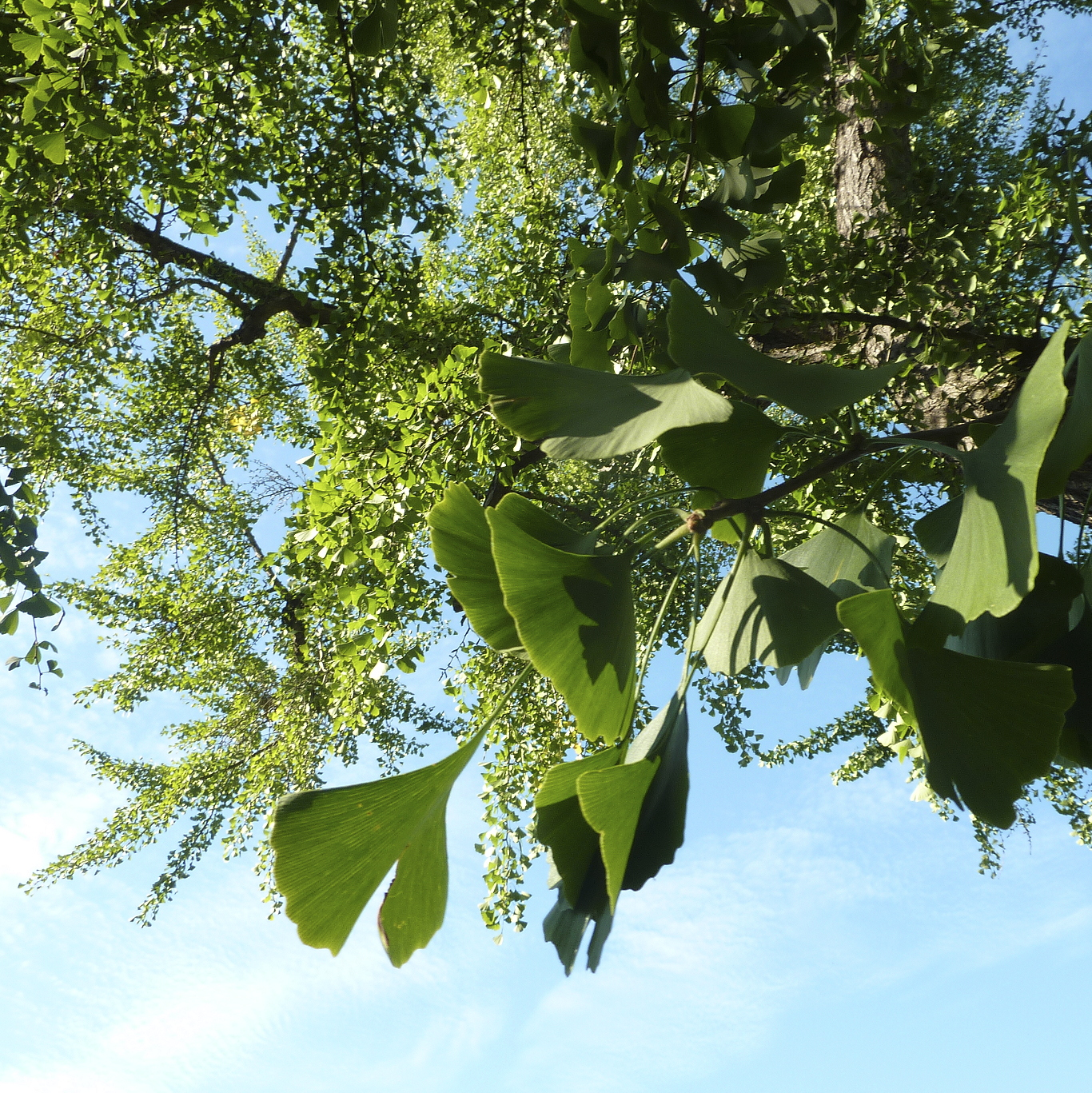 Der Ginkgo in Rödelheim ist ein im Jahr 1750 gepflanztes Exemplar der aus China stammenden Baumart Ginkgo biloba. Der rund 18 Meter hohe Einzelbaum steht im Stadtteil Rödelheim der Stadt Frankfurt am Main, auf dem Grundstück des Petrihauses am Ufer des Flusses Nidda. Dieser Ginkgobaum gilt als das älteste Exemplar in Deutschland und hat den Status eines Naturdenkmals.